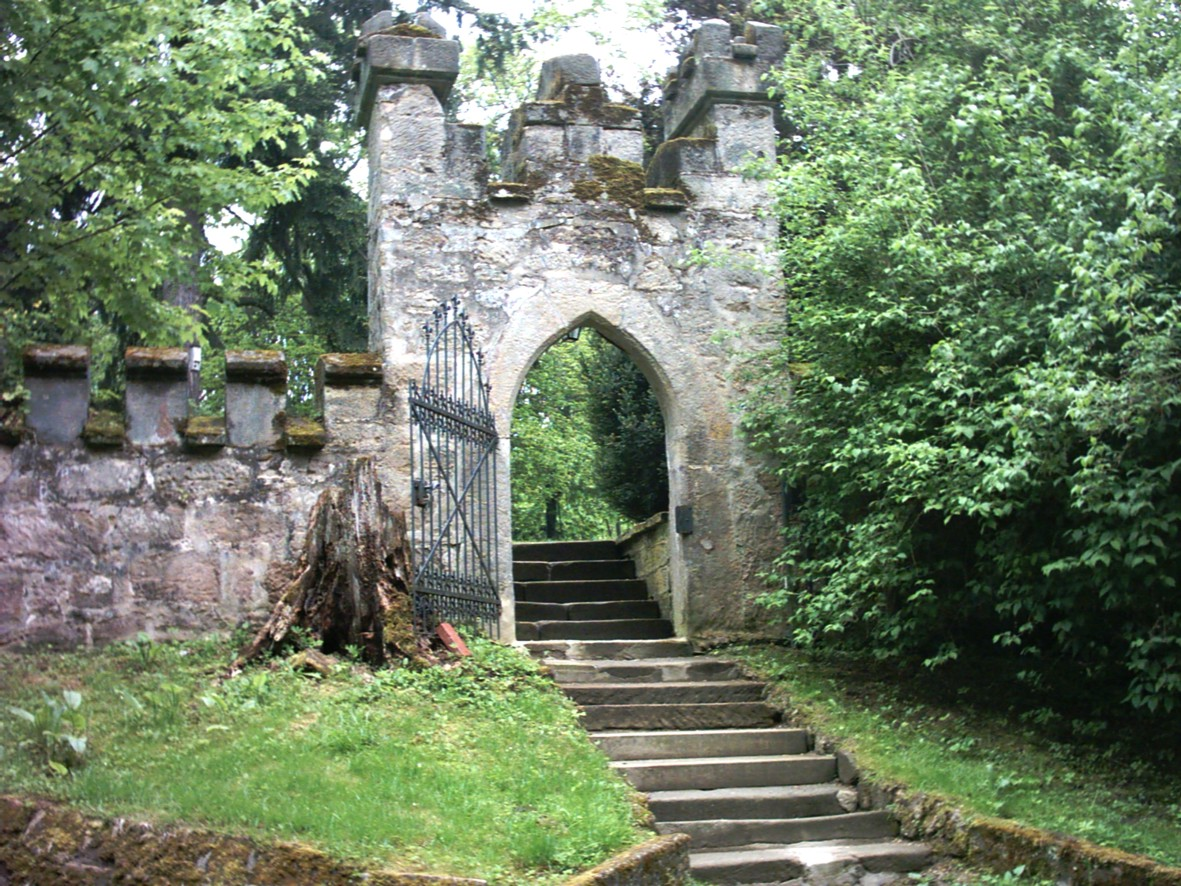 Schloss Hohenstein bei Coburg, Treppenaufgang Quelle: selbst fotografiert Fotograf/Zeichner: presse03 Datum: 14.05.2006